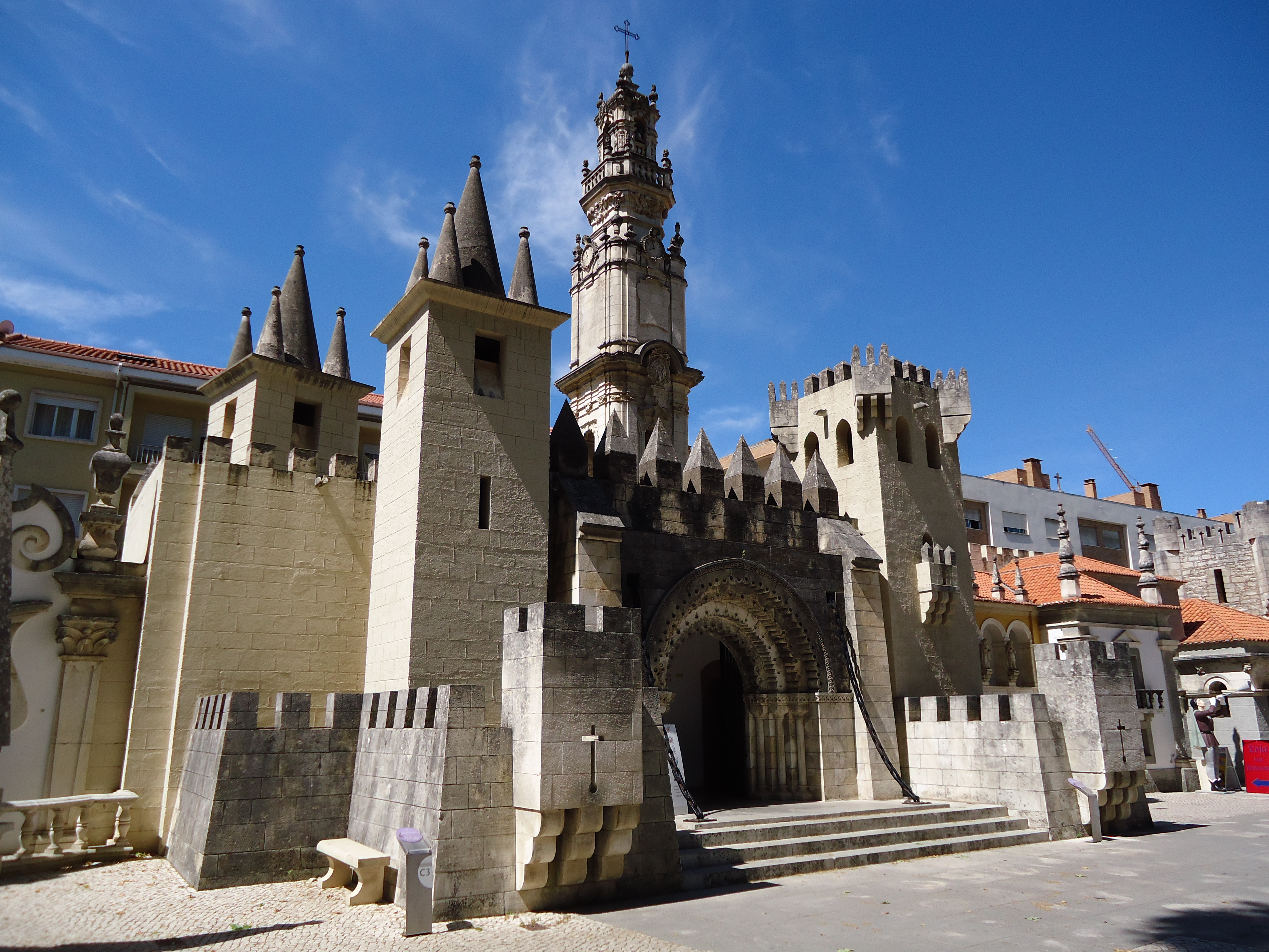 Portugal dos Pequenitos, Coimbra, Portugal: área de Portugal Monumental (Museu do Traje).